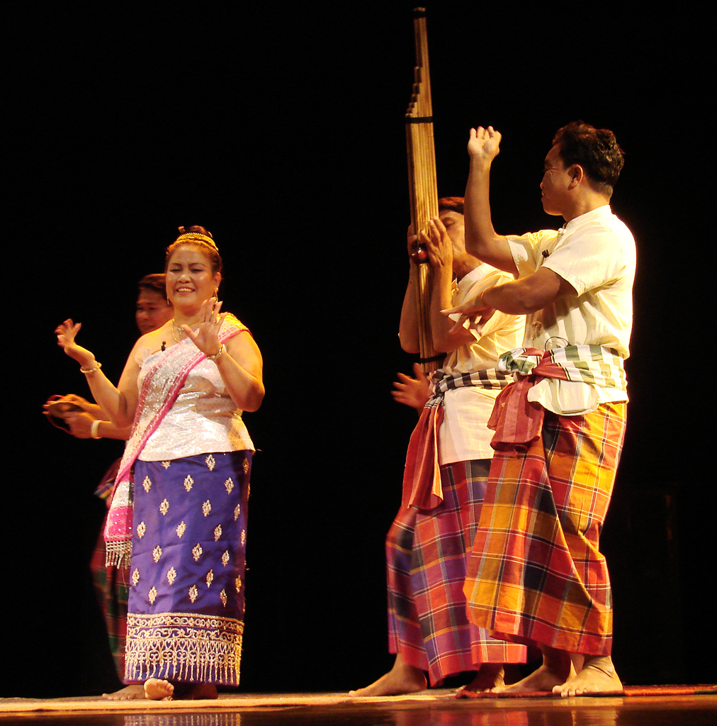 Molams et Mokhènes Chants et orgue à bouche Festival de l'Imaginaire 2009 Maison des cultures du monde Une musique populaire originale, très rarement entendue à Paris, même dans les lieux spécialisés pratiquée par des musiciens de qualité.